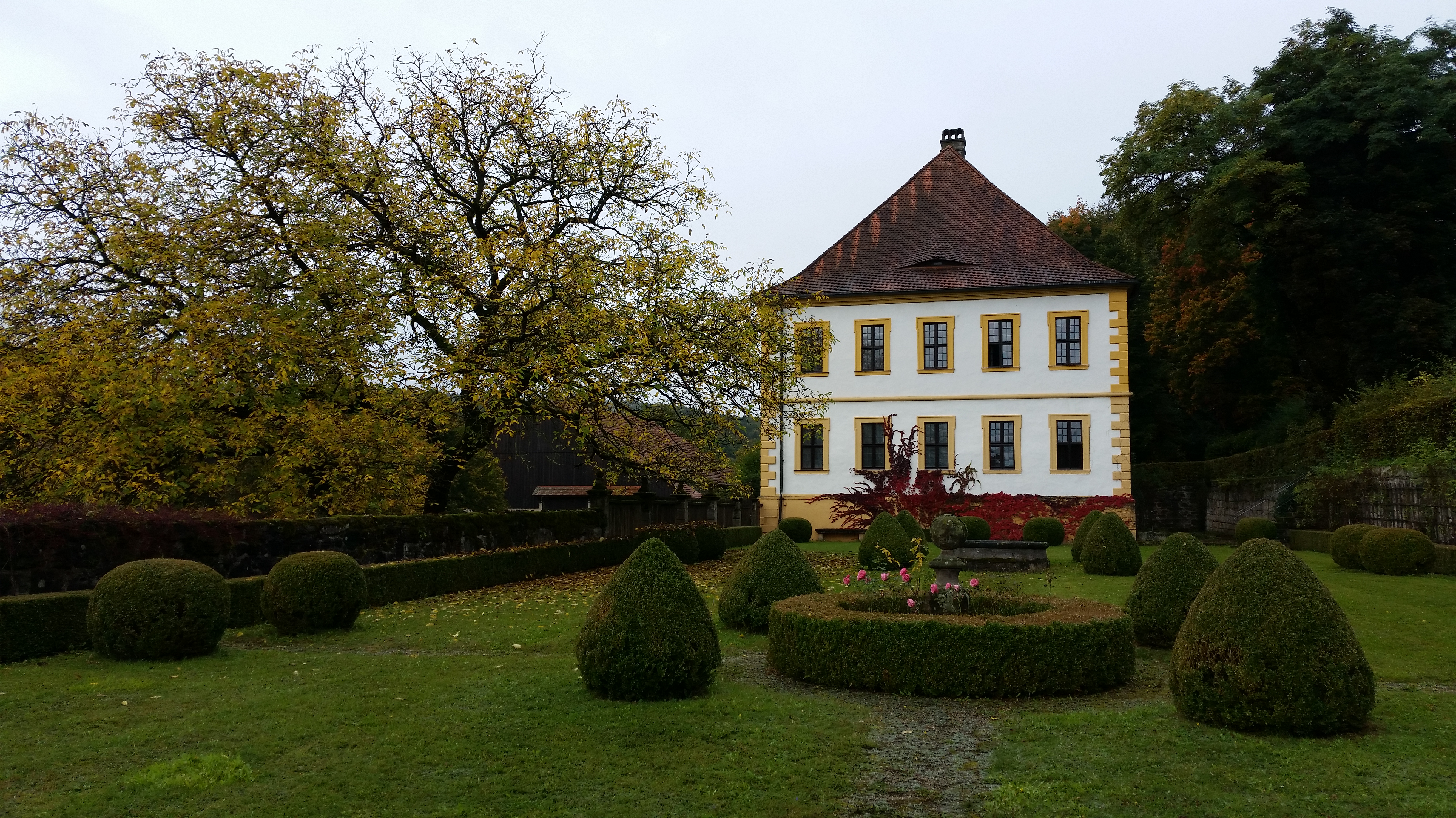 Ostansicht Schloss Weißenbrunn mit Barockgarten